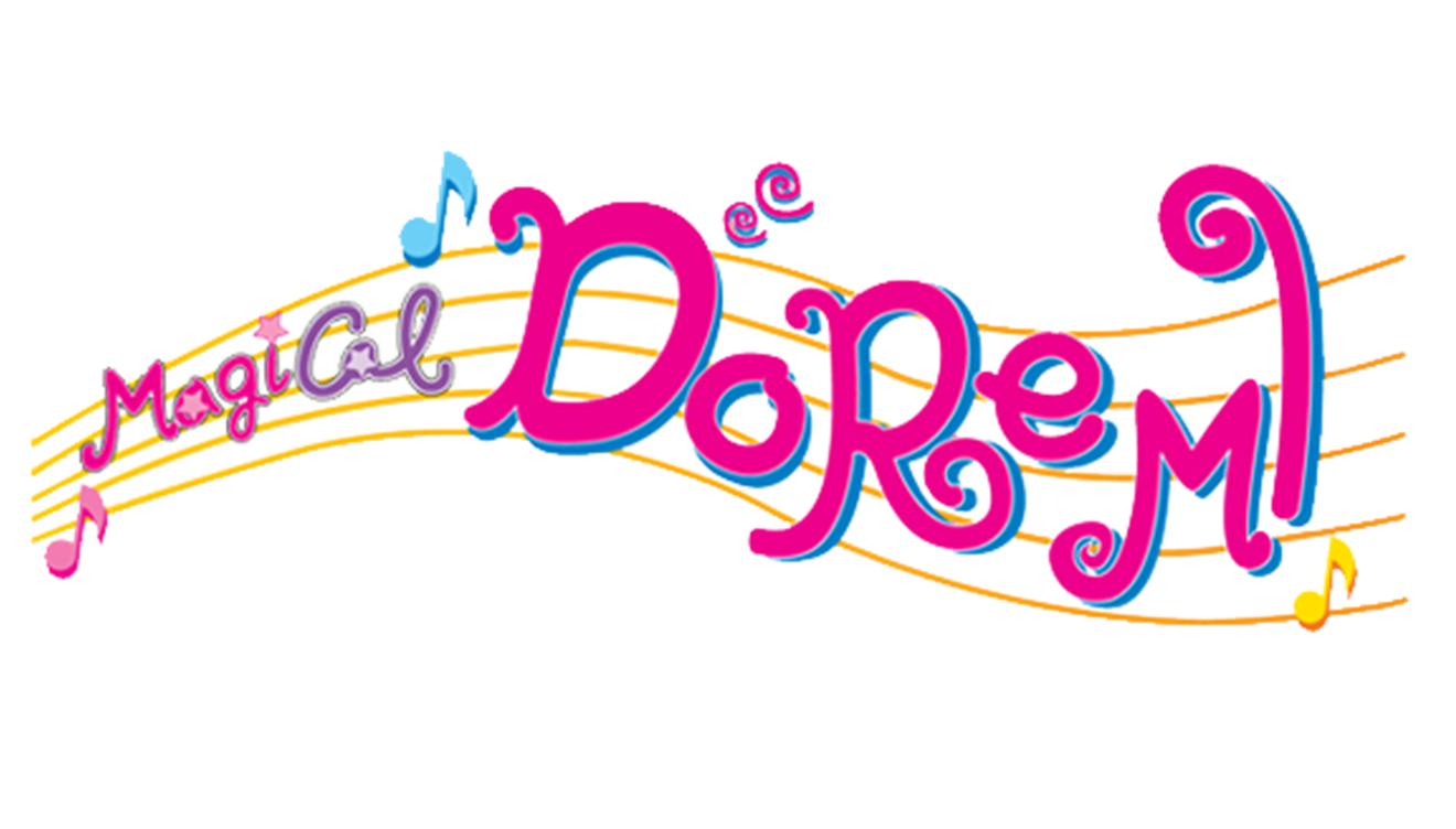 Logo de la série animé japonaise Magical Doremi